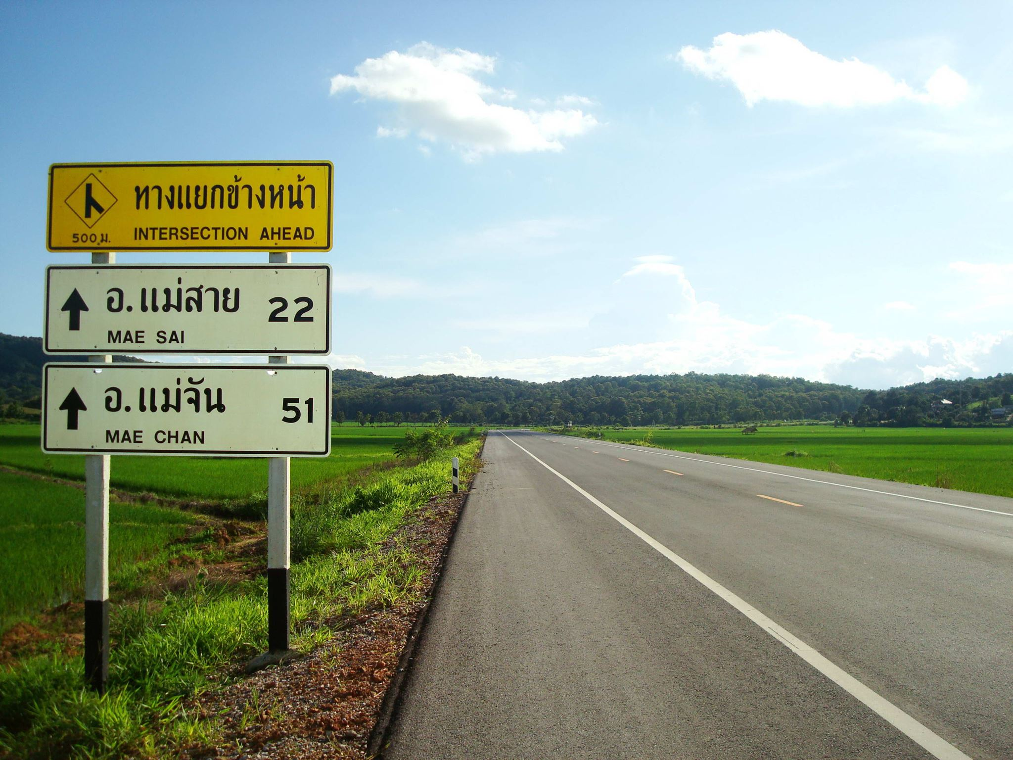 ทางหลวงแผ่นดินหมายเลข 1290 ตอนเลี่ยงเมือง บ.เวียงแก้ว